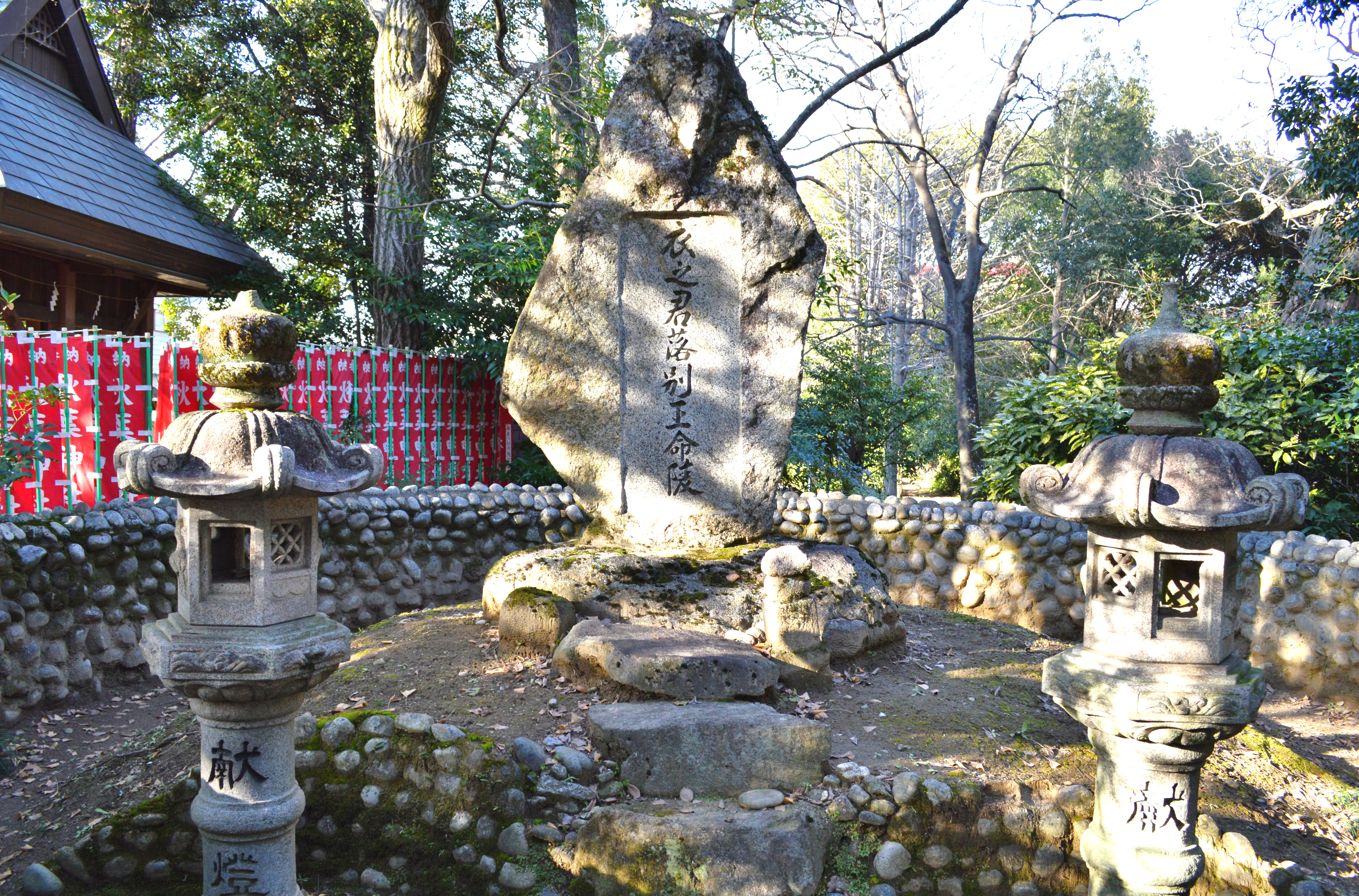 児ノ口社境内 衣之君落別王命陵